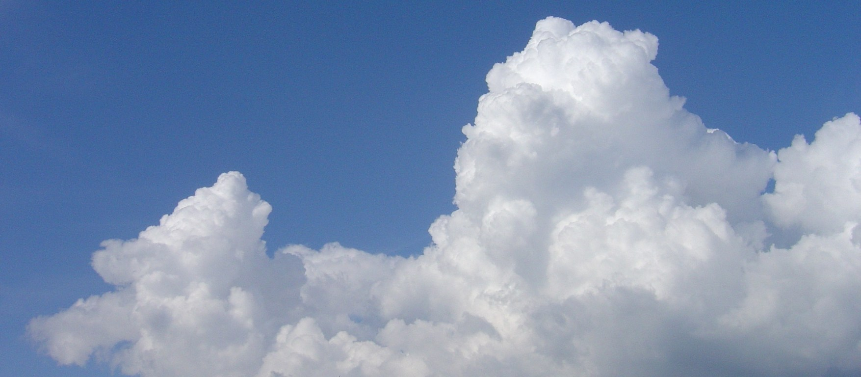 Cumulus clouds